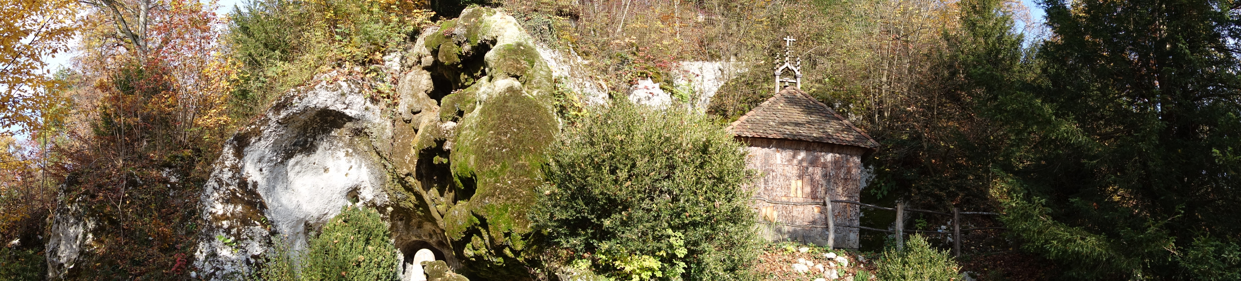 Ermitage Arlesheim, Panorama der Eremitenklause oder Waldbruderklause, 1789 wird die Figur des Eremiten, der ehemals in der heutigen Gessnergrotte lag, in ihr jetziges Domizil verlegt